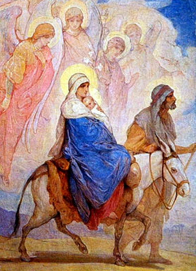 Эскиз для мозаики храма Воскресения (Спас на Крови)